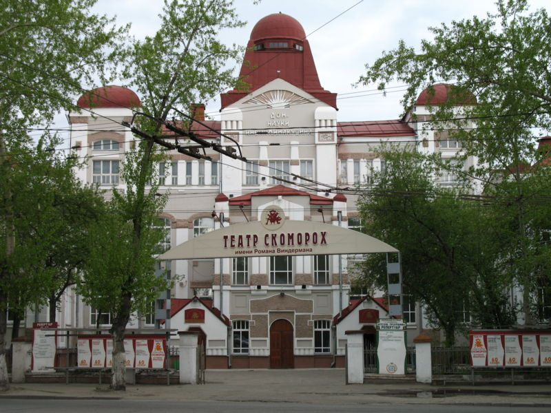 Томский театр кукол «Скоморох»